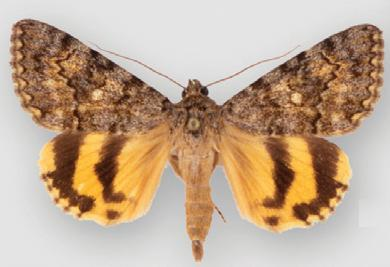 Catocala benjamini